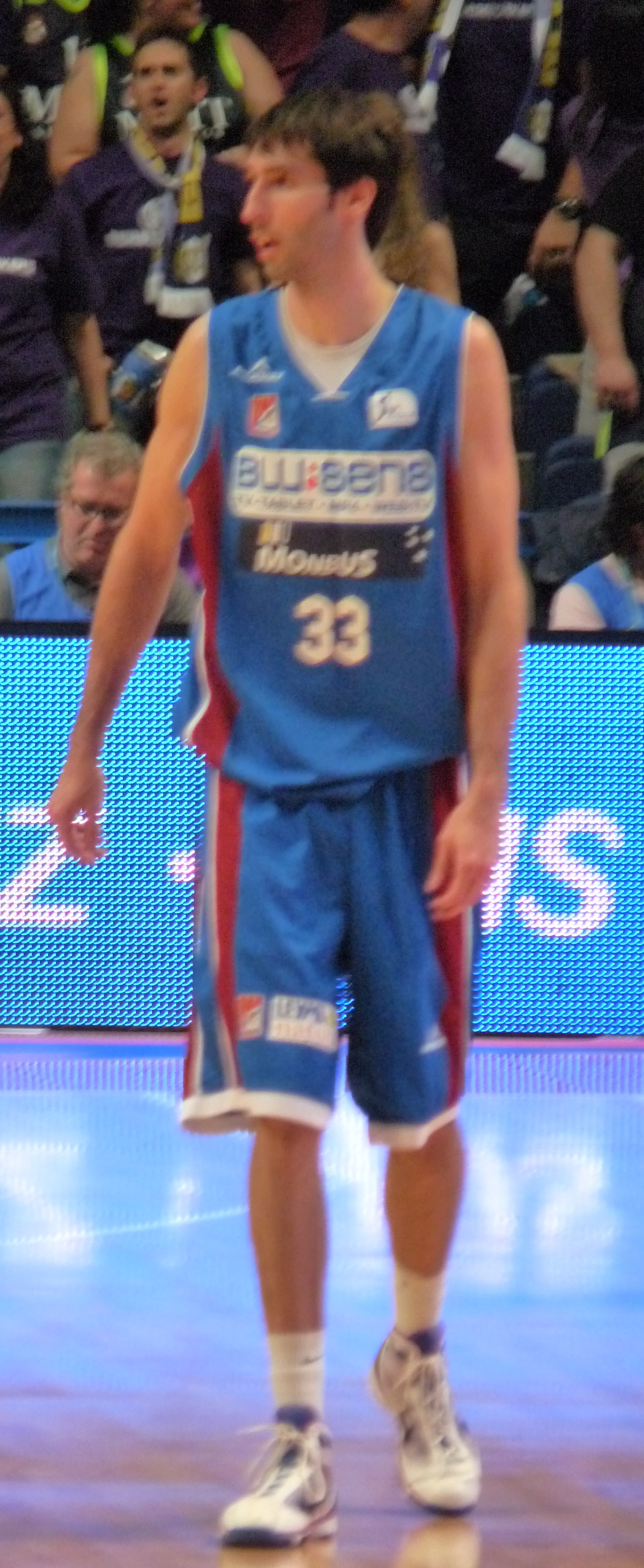 Alberto Corbacho